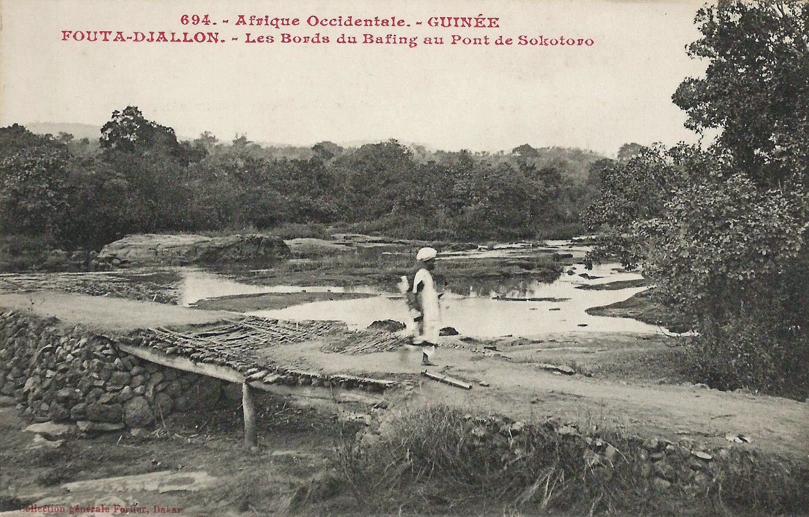 François-Edmond Fortier, Fouta-Djallon. Les Bords du Bafing, au pont de Sokotoro. Afrique Occidentale. Guinée